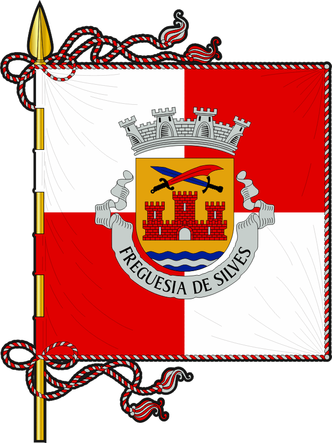 bandeira da freguesia de Silves